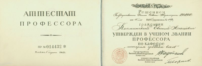 Аттестат профессора, выданный в Москве в 1946 году